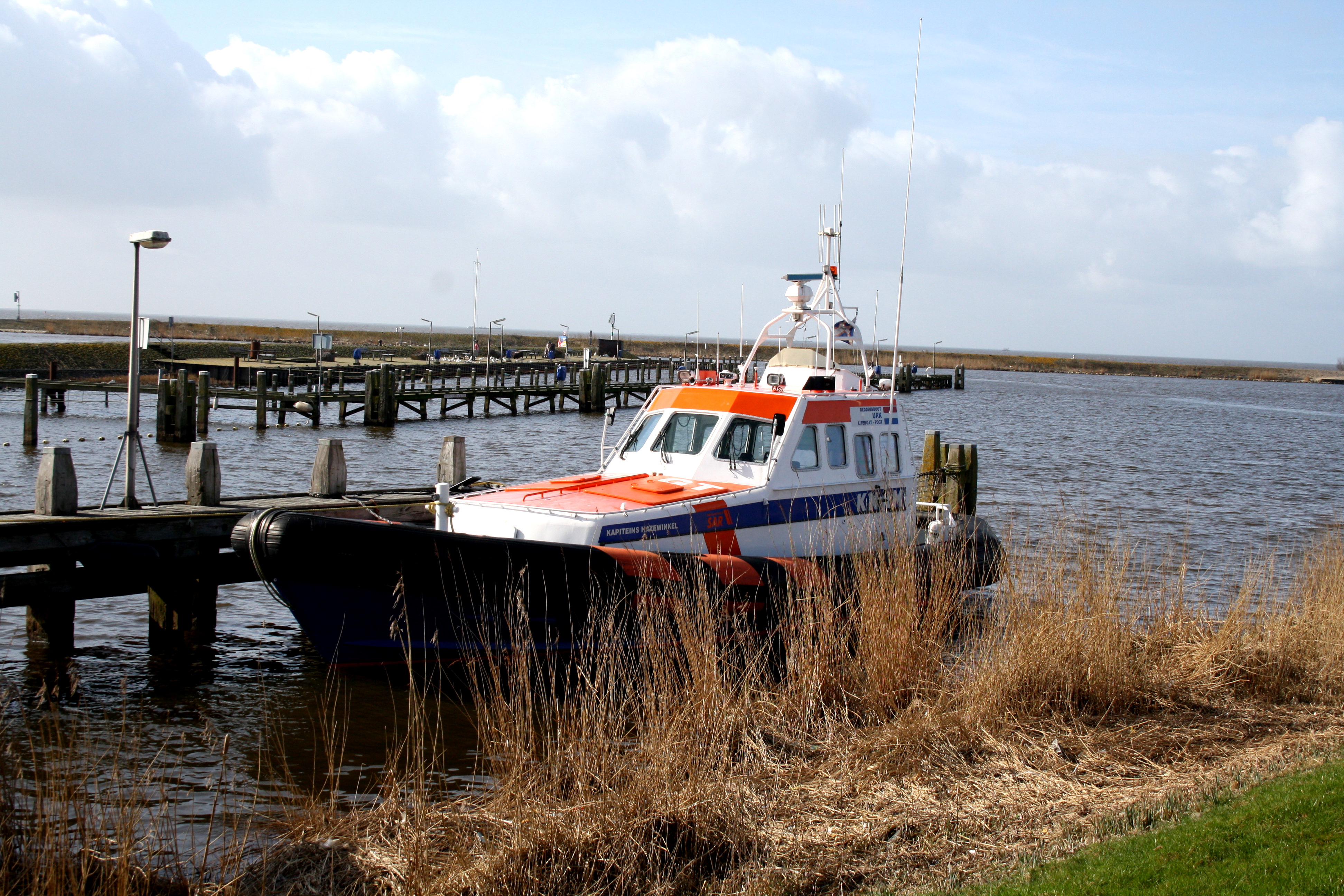 Haven Urk - KNRM - Kapiteins Hazewinkel. Reddingboot Kapiteins Hazewinkel' Lengte over alles: 15 meter Breedte: 5,40 meter Vermogen: 2 x 715 pk Aandrijving: Twee Hamilton waterjets, die de 'Kapiteins Hazewinkel een snelheid van 34 knopen geven. Capaciteit geredden: 90 personen.